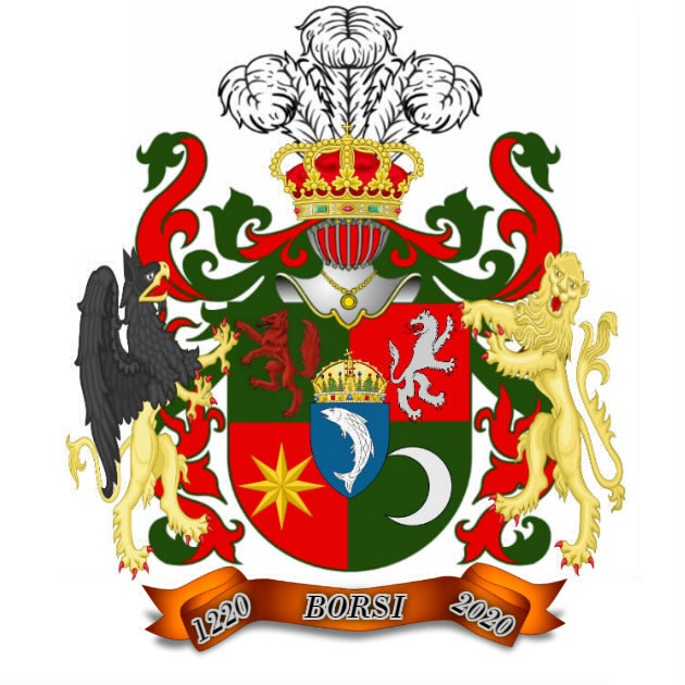 A Nemzetség 800 éves fennállásának emlékére készült Borsi címert!